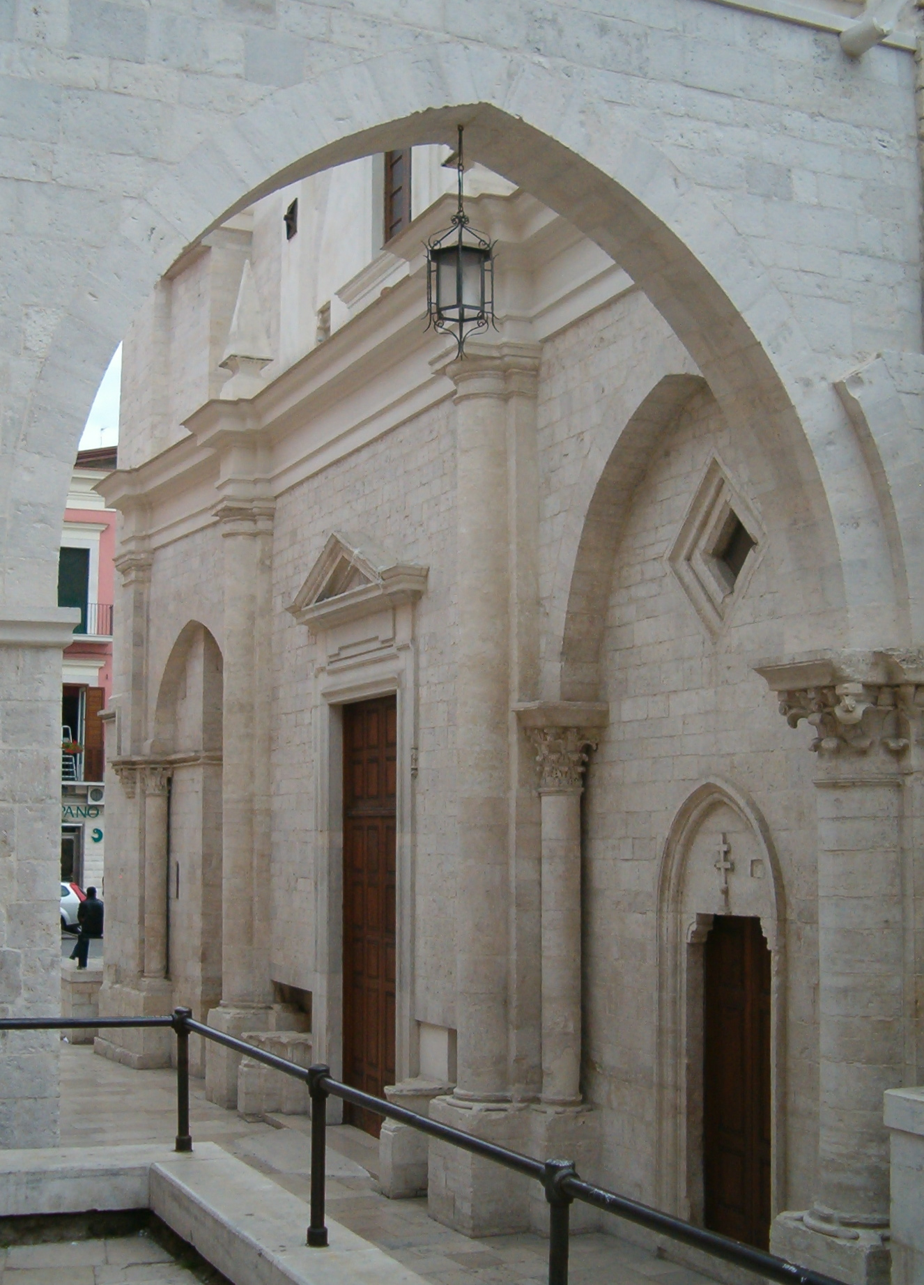 Barletta (Puglia, Italy). Chiesa d. S. Sepolcro